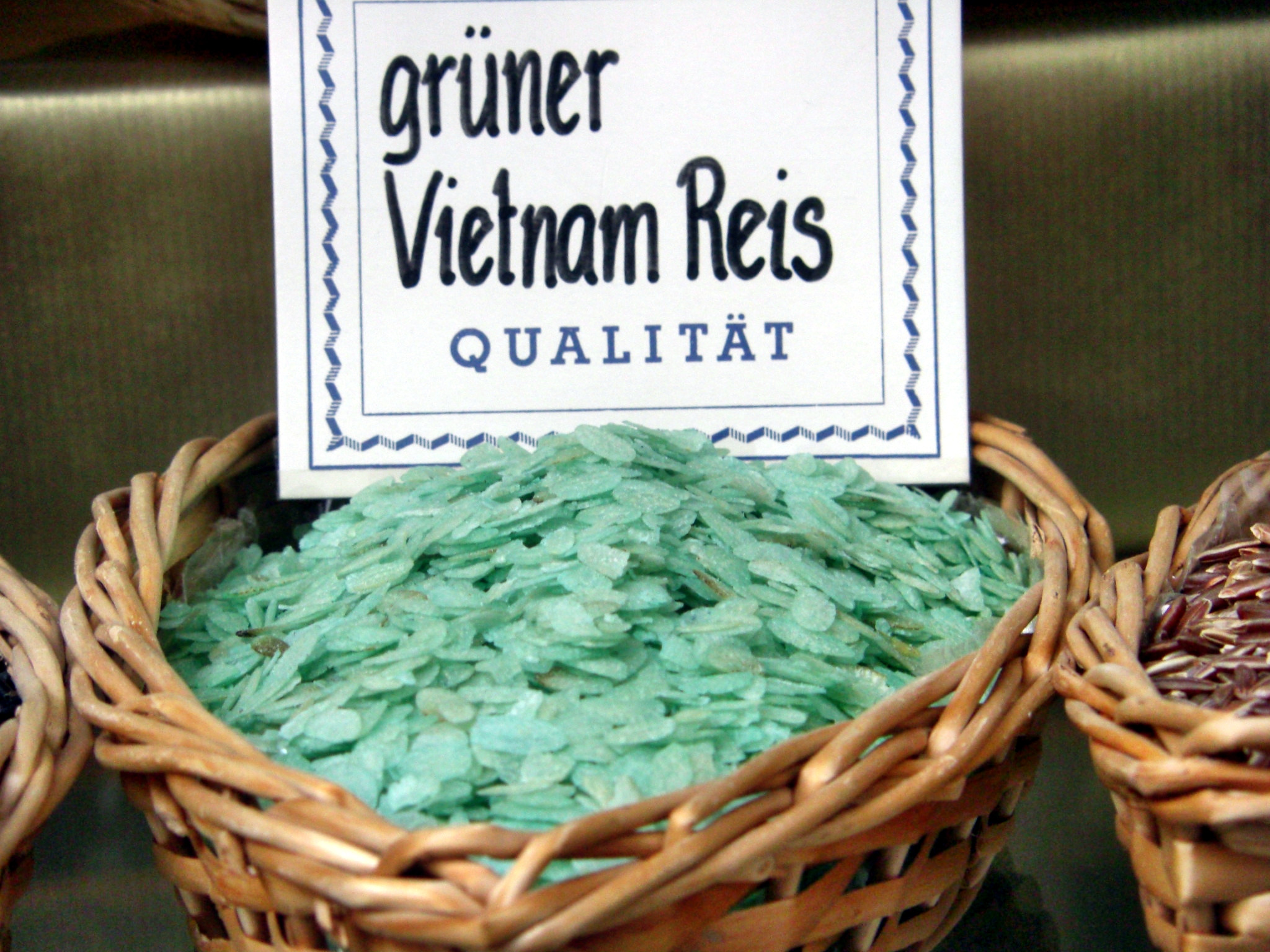 Grüner Reis aus Vietnam